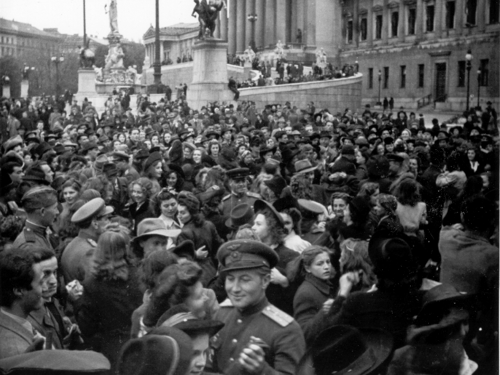 Мирные будни в послевоенной Вене